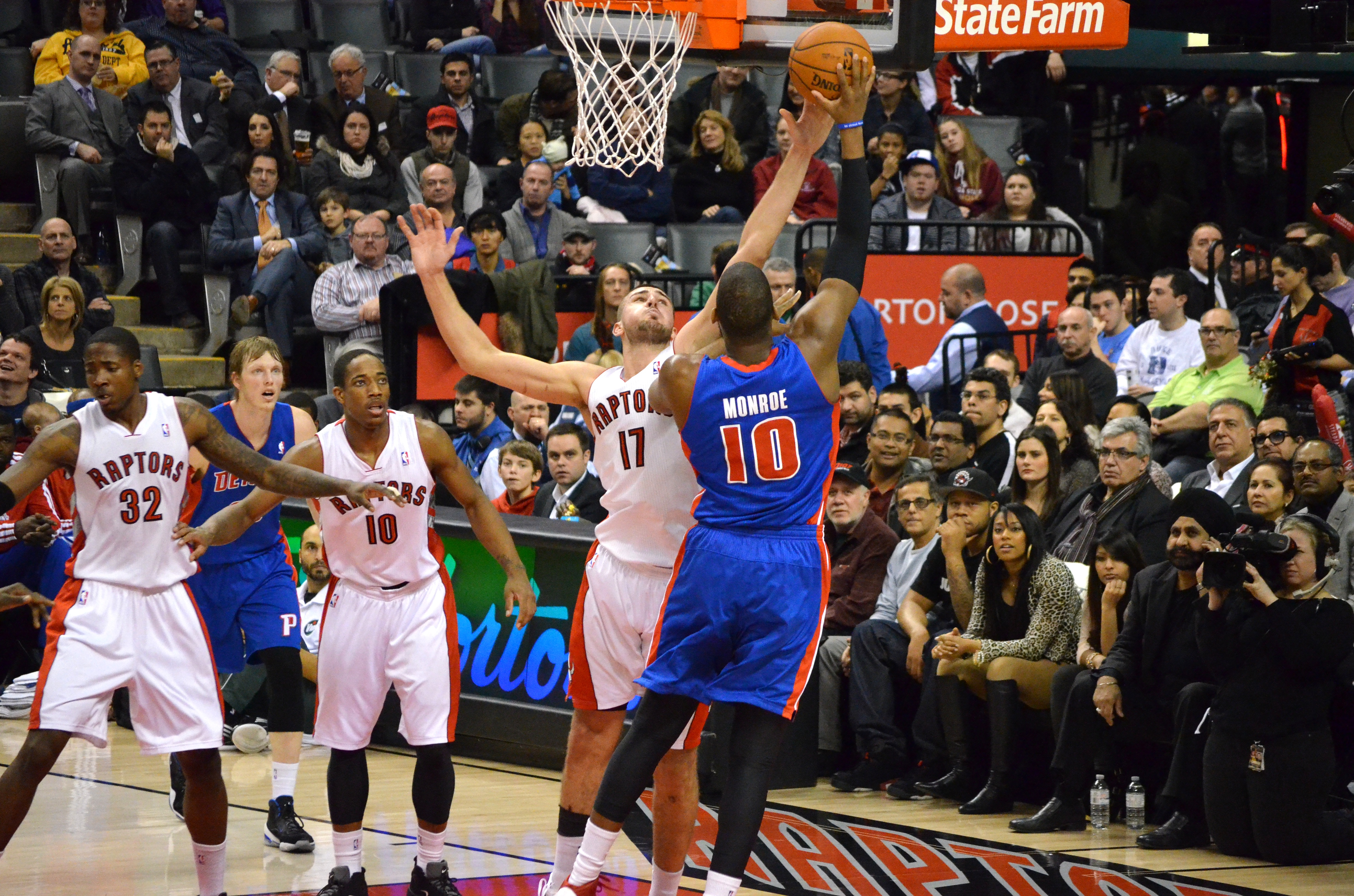 Greg Monroe Post Shot